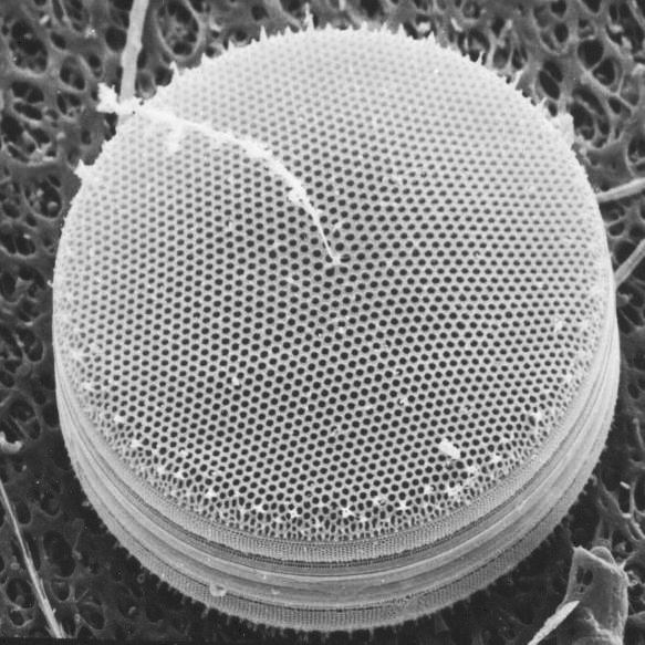 Centric diatom